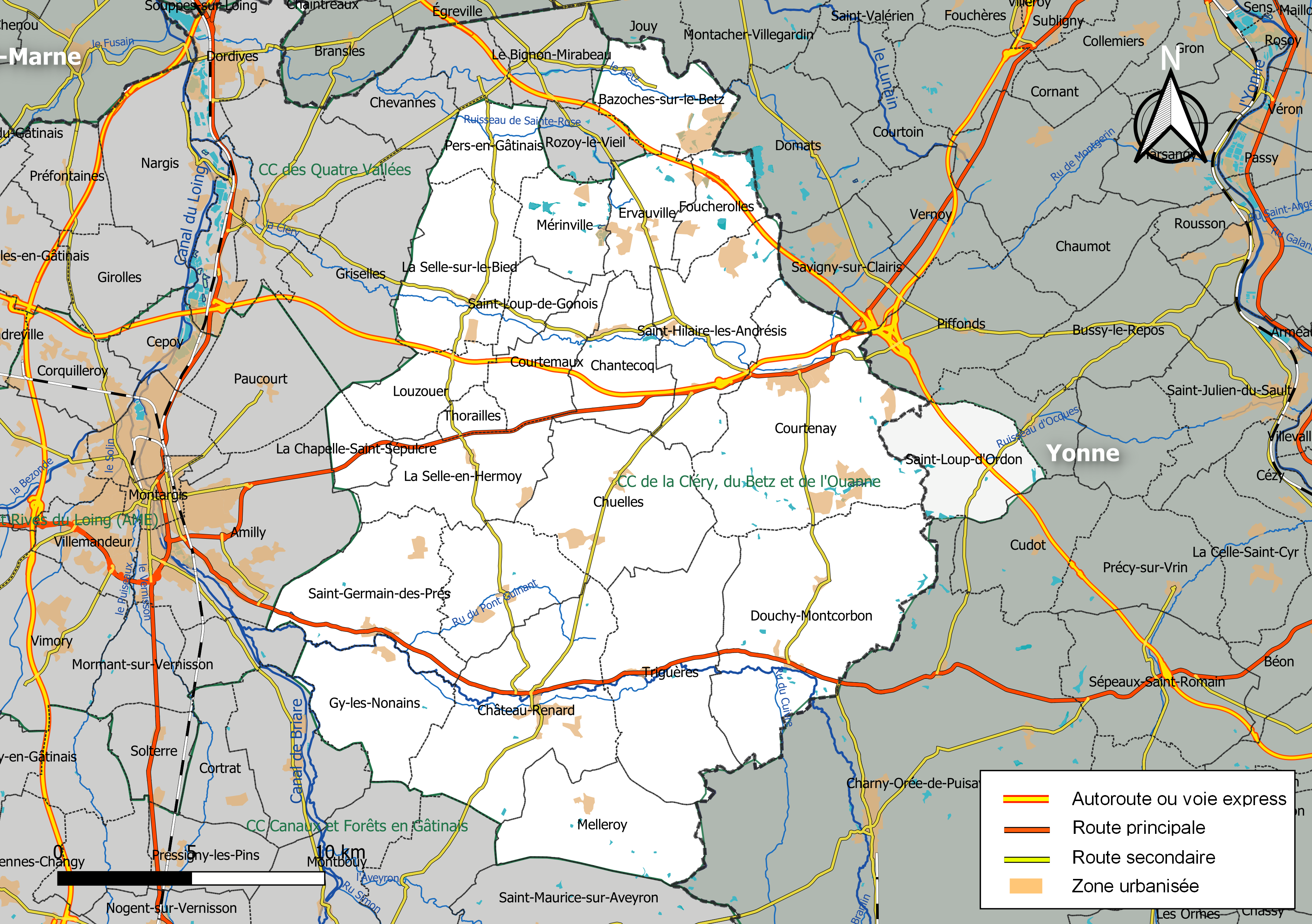 Carte géographique de la communauté de communes de la Cléry, du Betz et de l'Ouanne, département du Loiret, France. Composition au 1er janvier 2019.